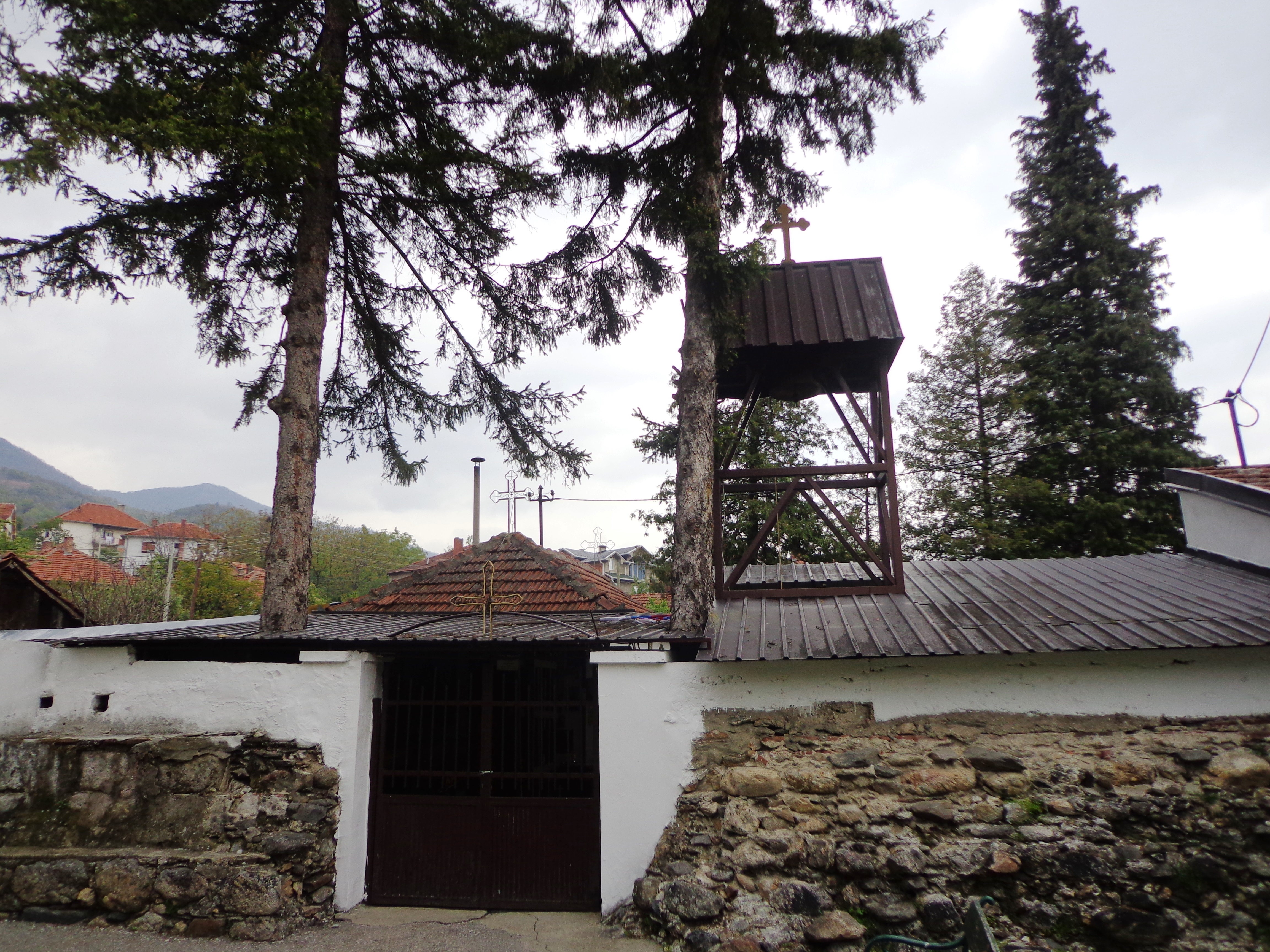 Ulaz u crkvu